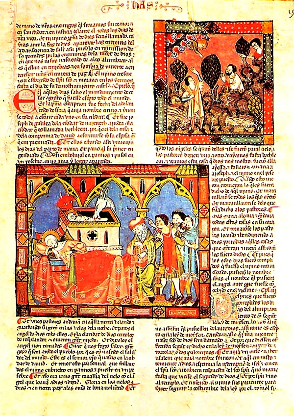 Grande e general estoria, de Alfonso X el Sabio (Toledo, España). Manuscrito de la Biblioteca del Escorial.